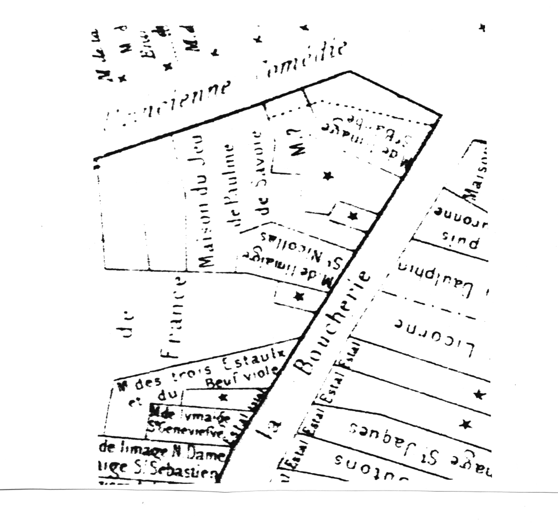 Détail agrandi de la feuille 9 du "plan de Berty", où apparaît la M(aison) des trois Estaulx et du Beuf (Boeuf) violé.